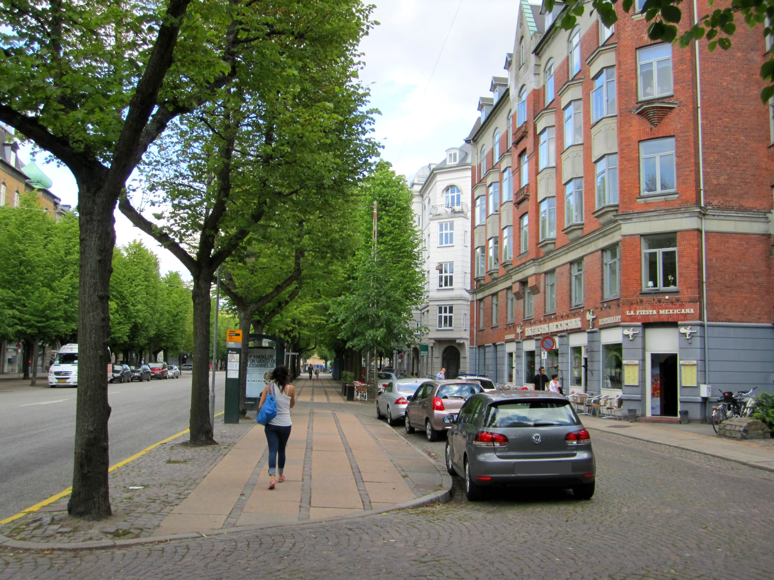 Frederiksberg Allë in the Frederiksberg neighbourhood of Copenhagen, Denmark